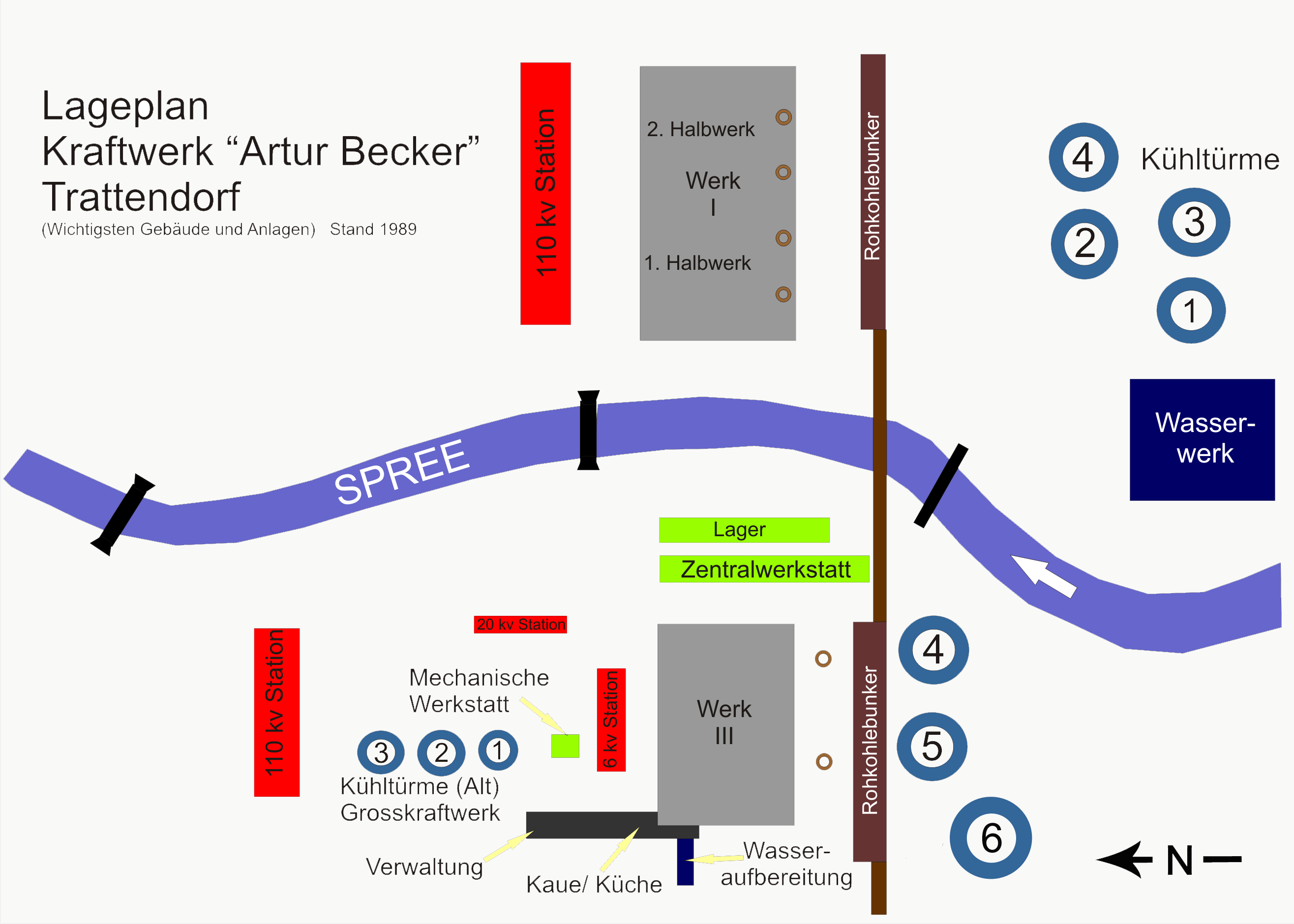 Lageplan der wichtigsten Gebäude des Kraftwerk "Artur Becker" Trattendorf.